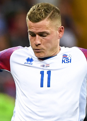 Сборная Исландии уступает Хорватии и покидает ЧМ-2018